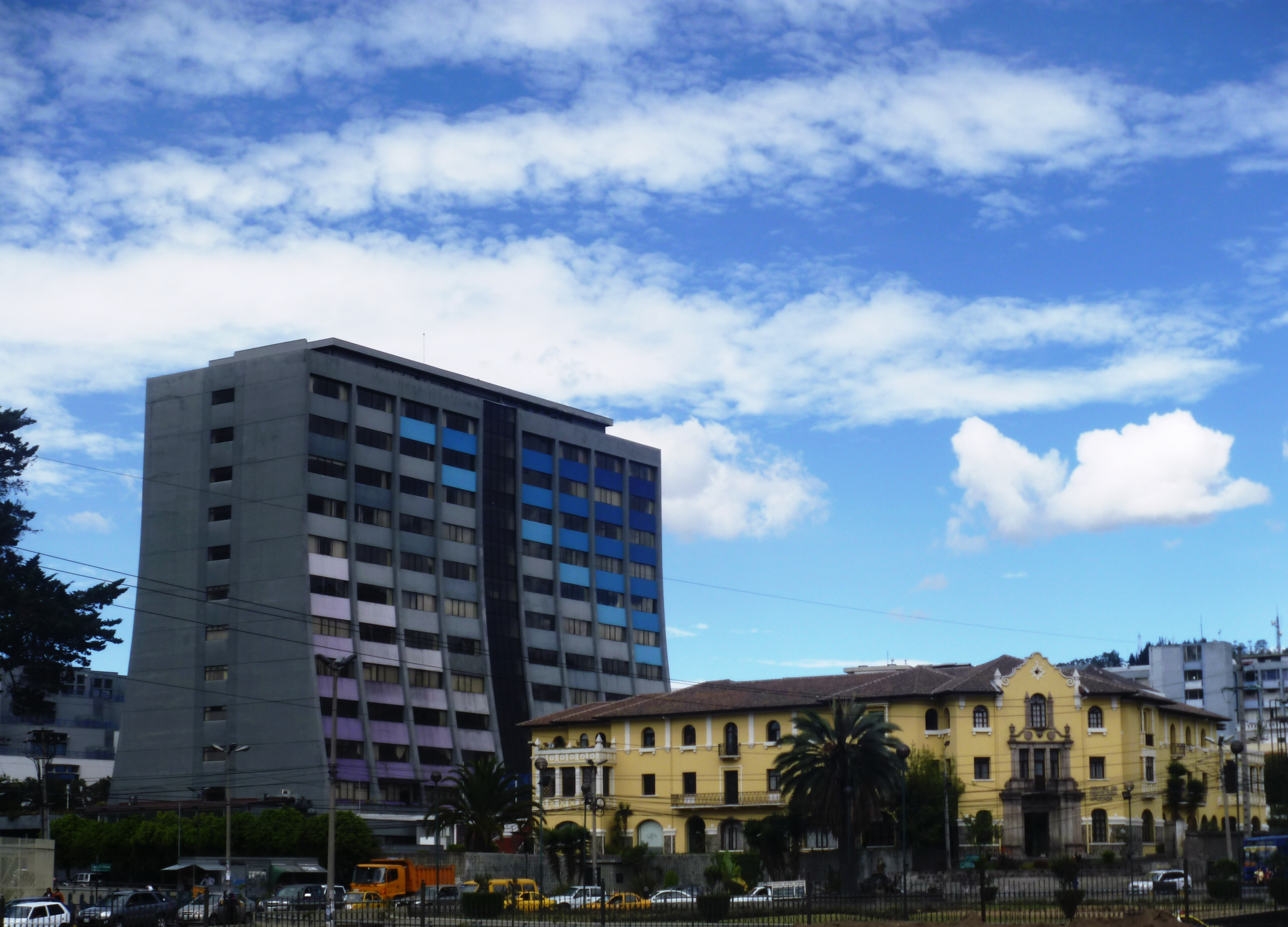 PUCE - Quito ´Panorámica del extremo suroccidental del campus de la Pontificia Universidad Católica del Ecuador, en la ciudad de Quito.